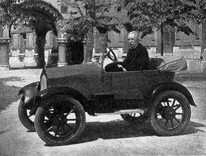 Auto von János Csonka, 1909